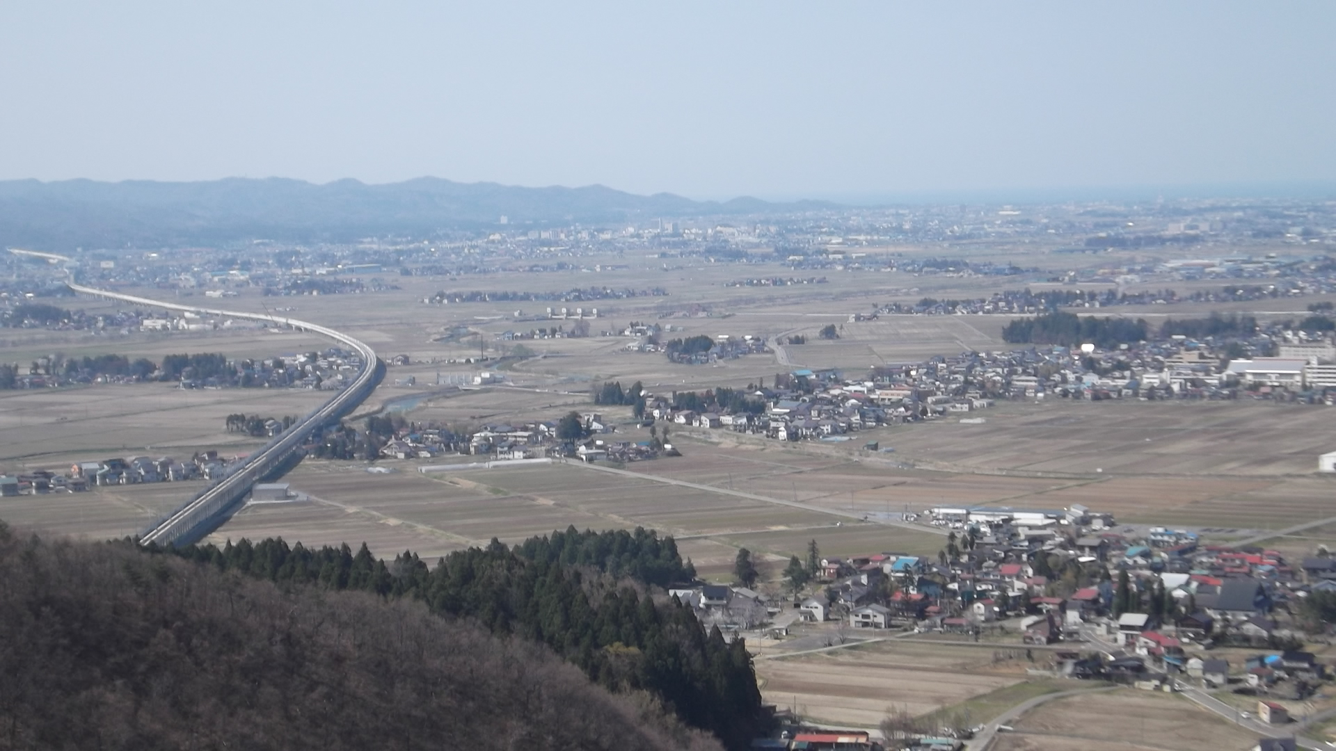 箕冠城本丸跡から観た高田平野の景色（手前は北陸新幹線の高架橋・新潟県上越市板倉区）